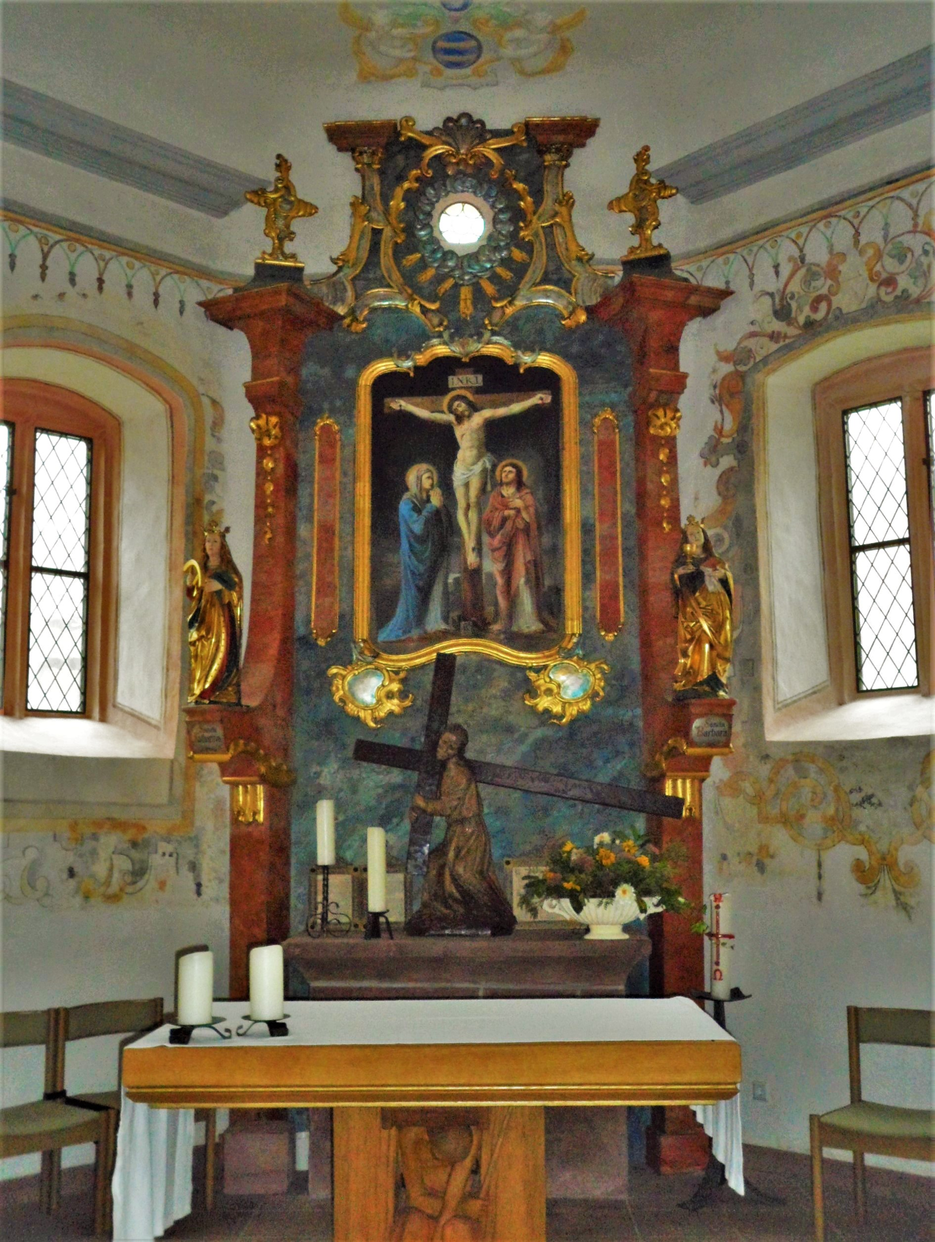 Altar von 1741 der Wallfahrtskirche Hl. Kreuz in Hohenwart, seit 1972 nach Pforzheim eingemeindet